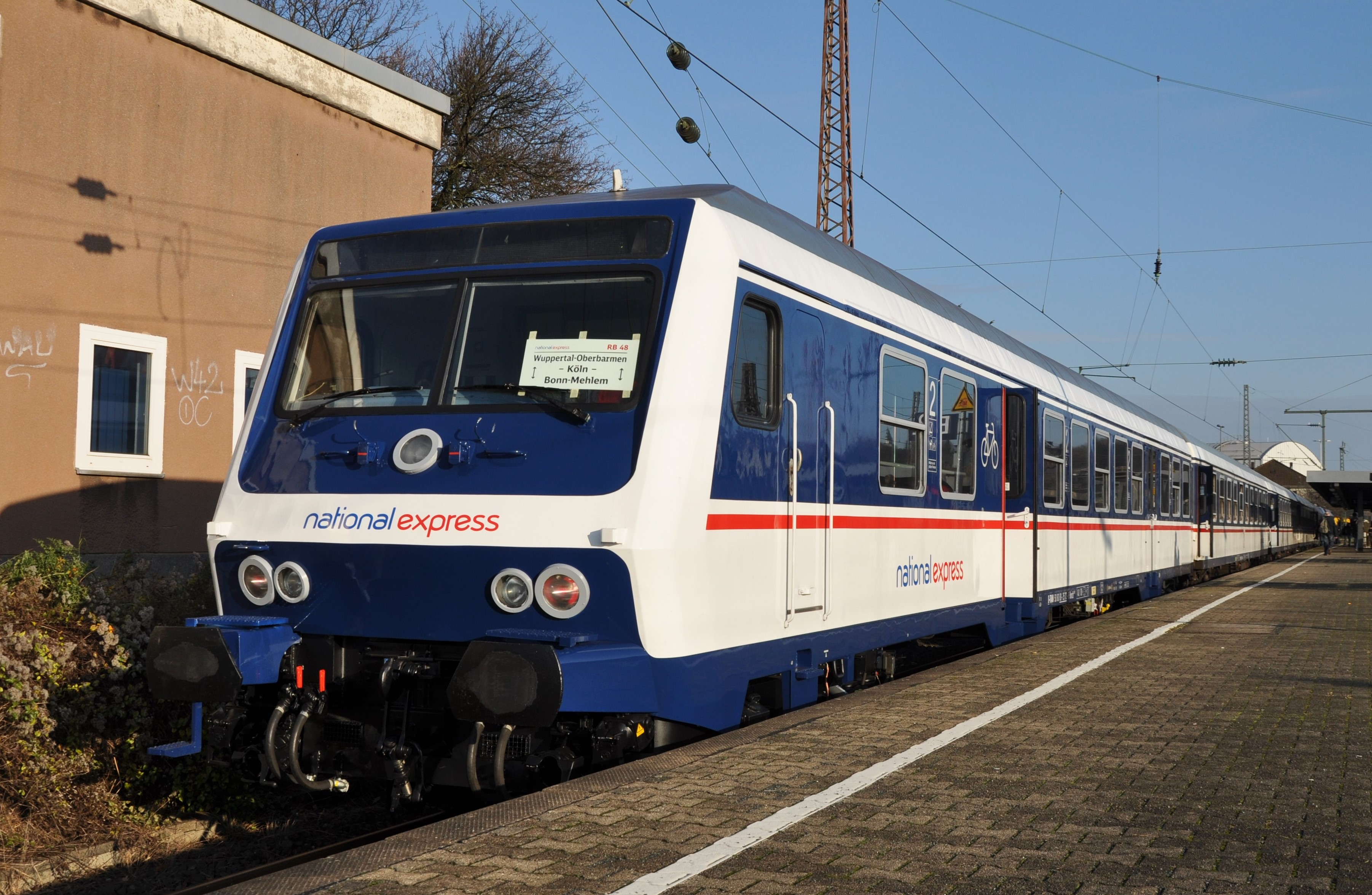 Wittenberger Steuerwagen in National Express-Lackierung auf der RB 48 im Bahnhof Wuppertal-Oberbarmen